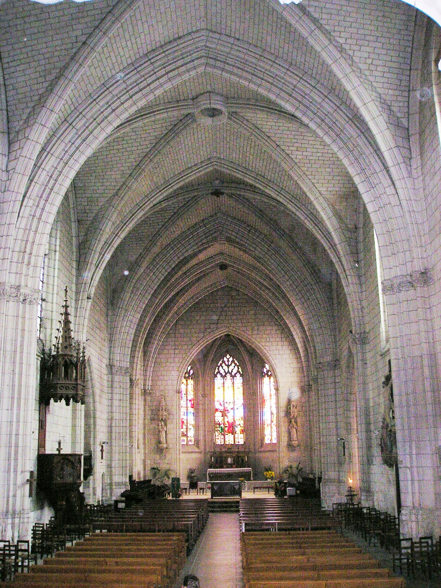 Chinon,_Saint-Étienne, Innenraum